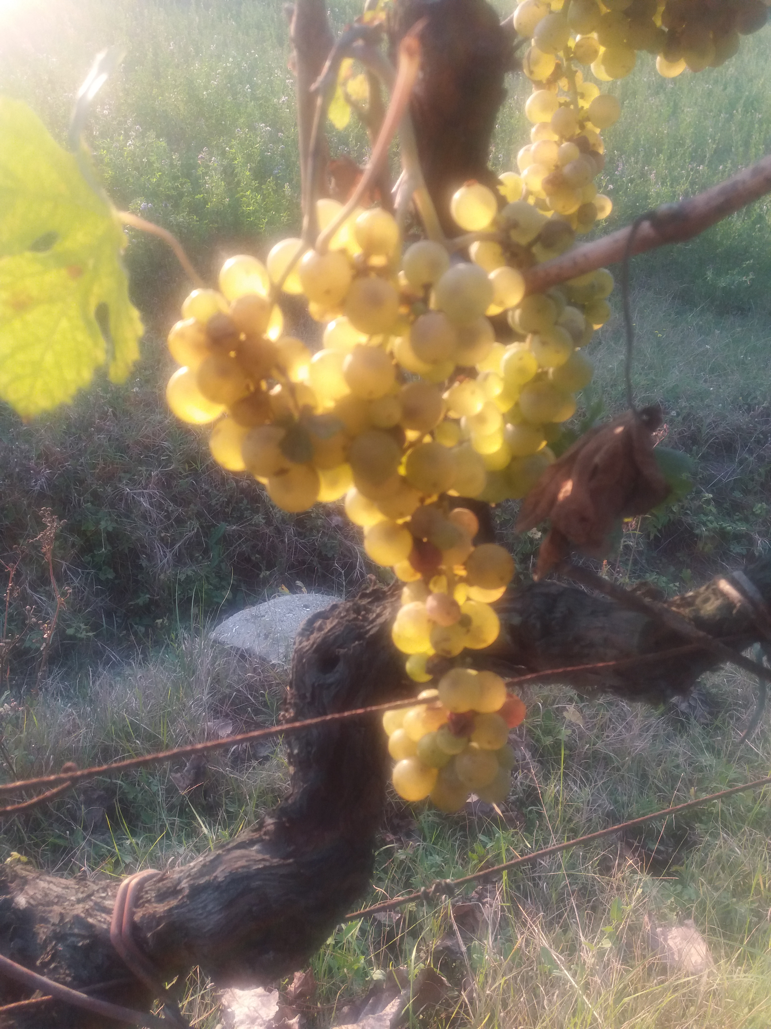 grappolo di uva trebbiano toscano giunto a maturazione